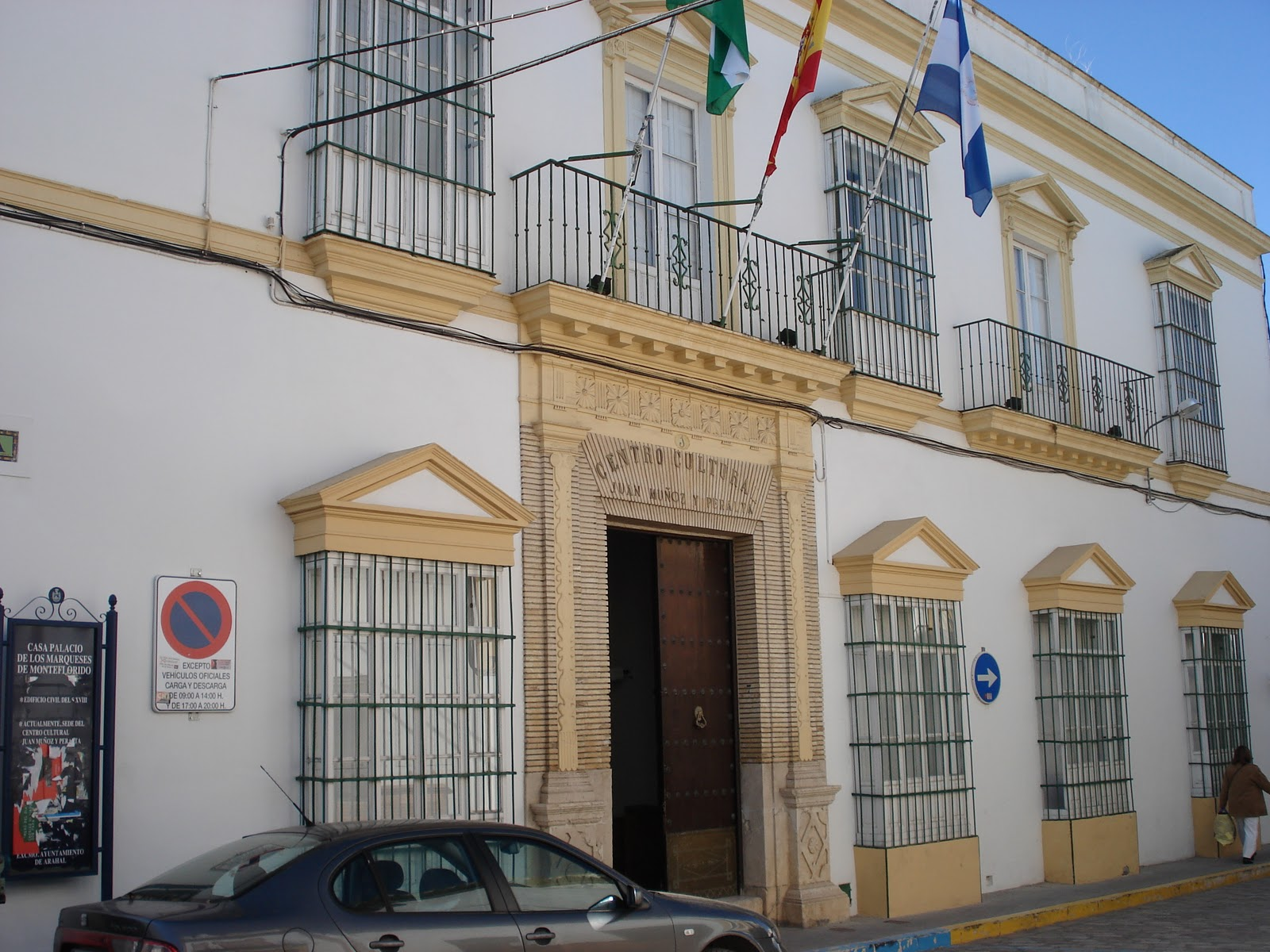 Casa del Marqués de Monteflorido, Arahal (Sevilla).